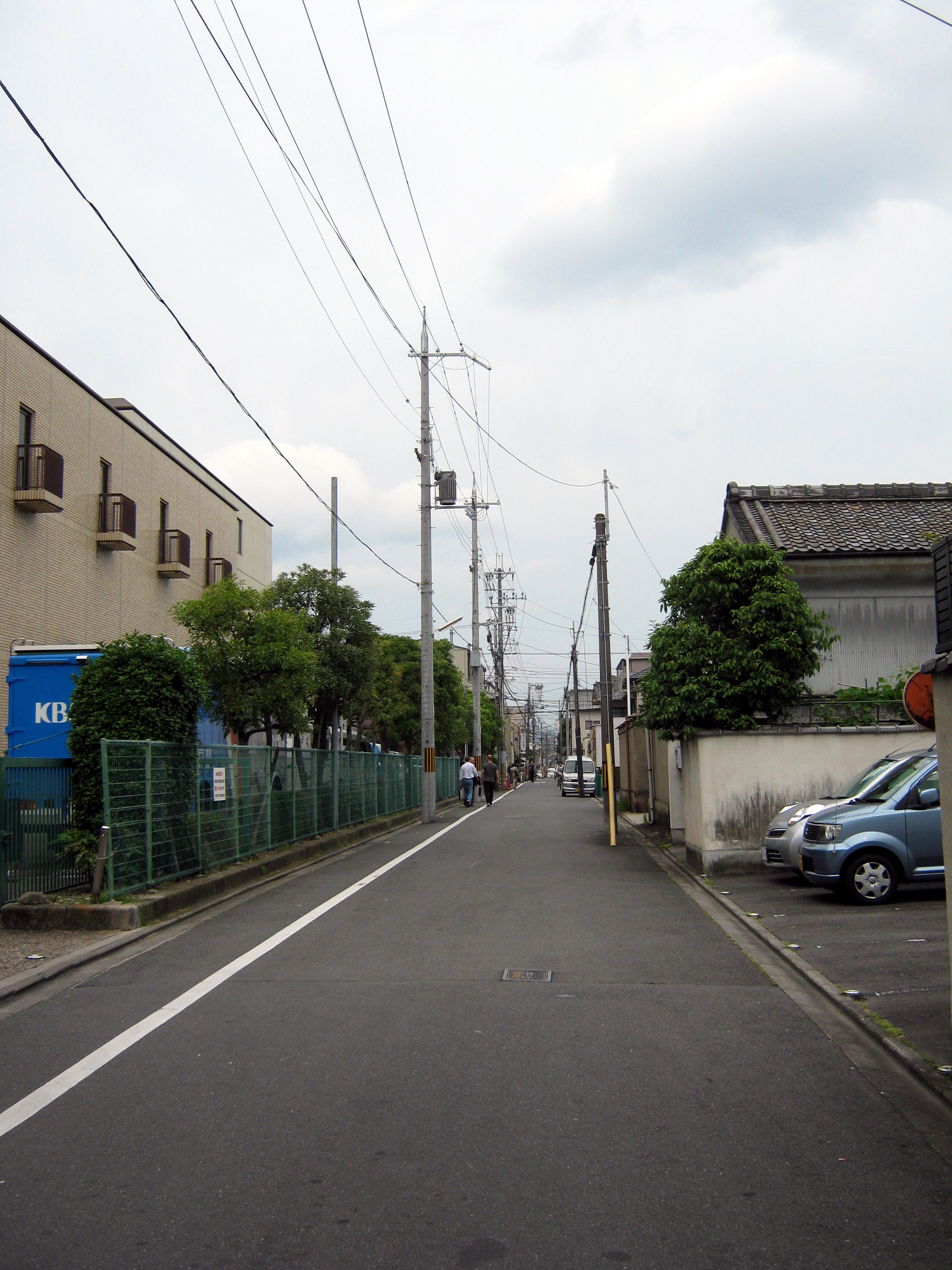 上長者通